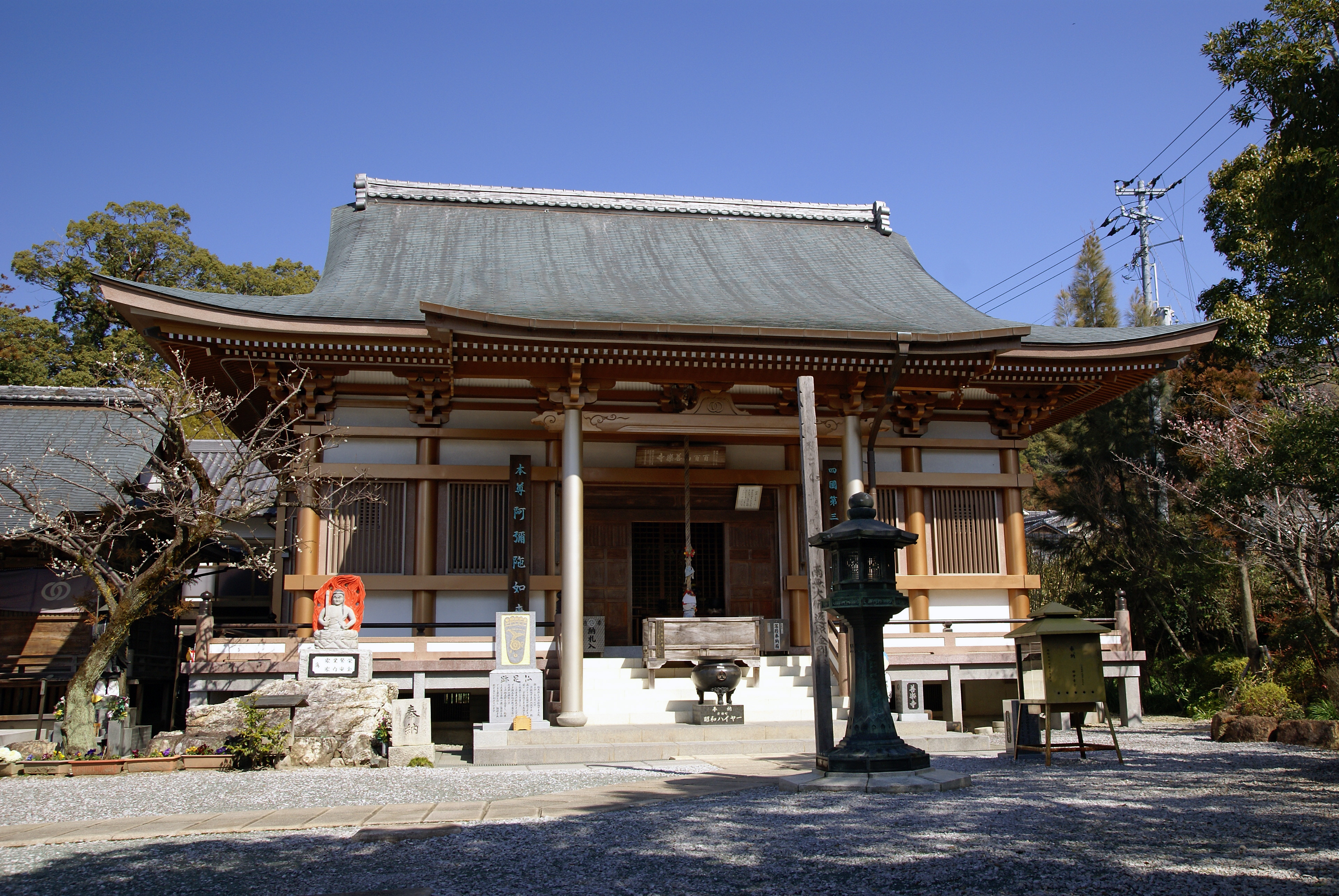 Zenrakuji in Kochi, Kochi prefecture, Japan